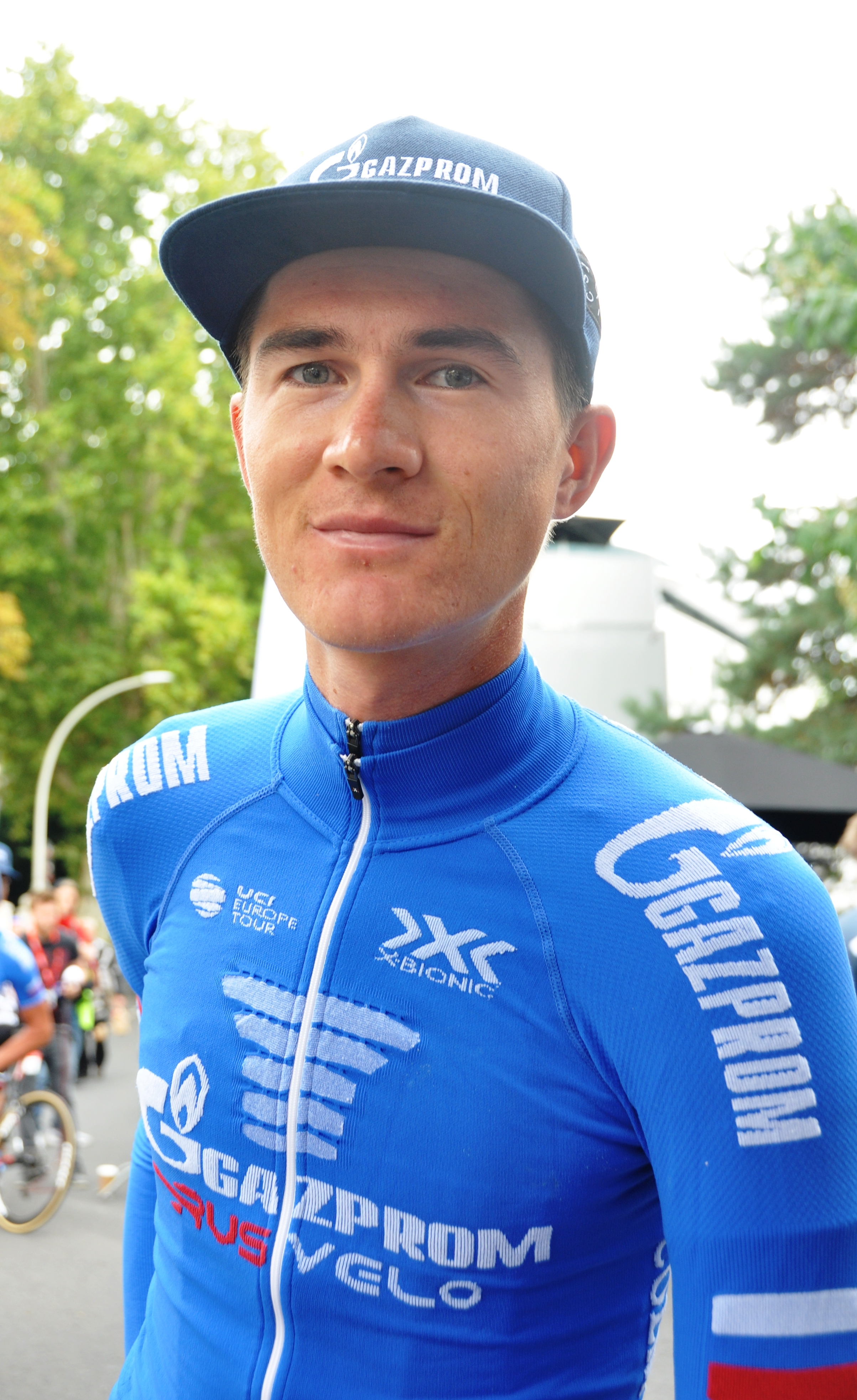 Ildar Arslanov, russischer Radrennfahrer (??) - Beschreibung prüfen